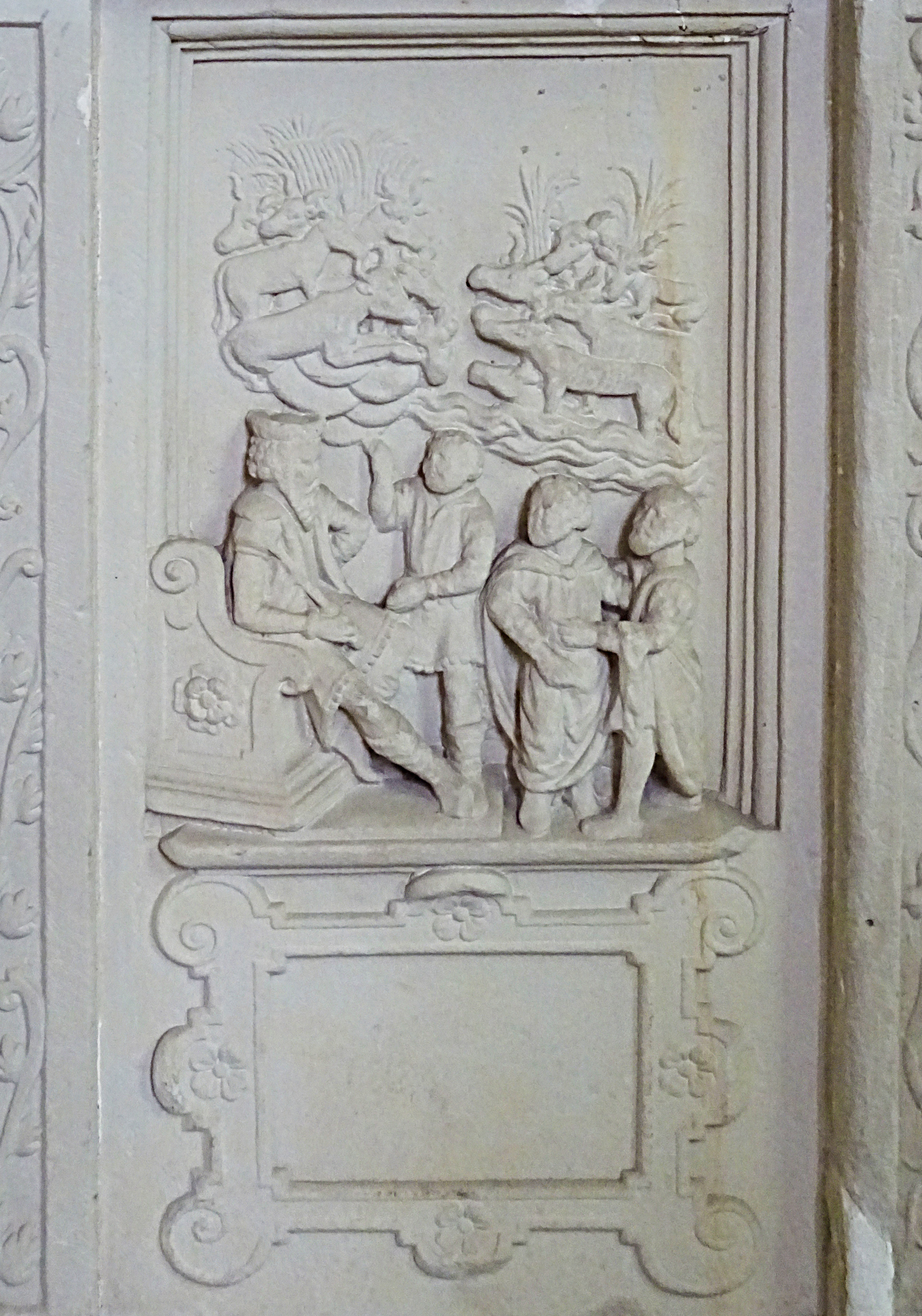 Steinbilderbibel in der St. Annenkirche (Eisleben), 14/29, Josef deutet die Träume des Pharaos